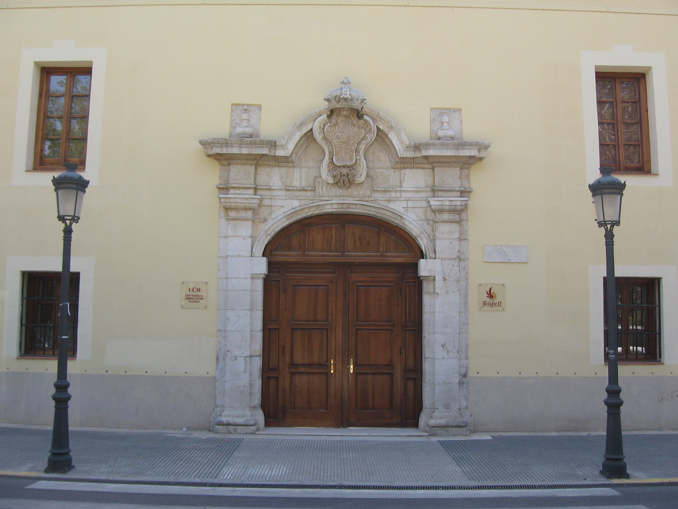 Portada del Antiguo Cuartel de Pavía de Aranjuez, ahora sede del Centro de Estudios Superiores Felipe II (adscrito a la Universidad Complutense de Madrid) / Main door of the old Barracks of Pavia of Aranjuez, now building of Philip II University Foto realizada por: / Picture taken by: Ángel Serrano Sánchez de León